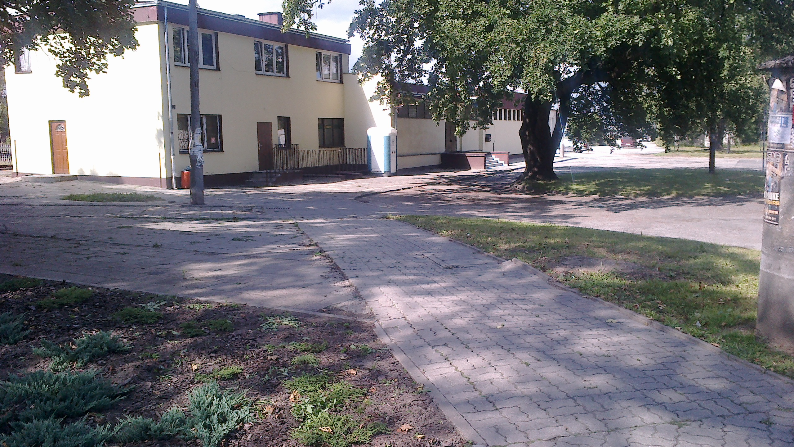 Dworzec PKP Janikowo od strony miasta